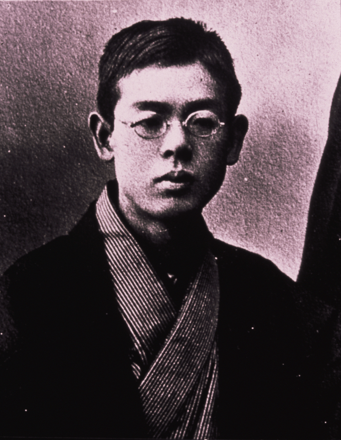 滝廉太郎(Taki Rentaro,1879-1903)